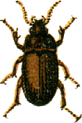 This file has been extracted from another file: Jacobs06.jpg